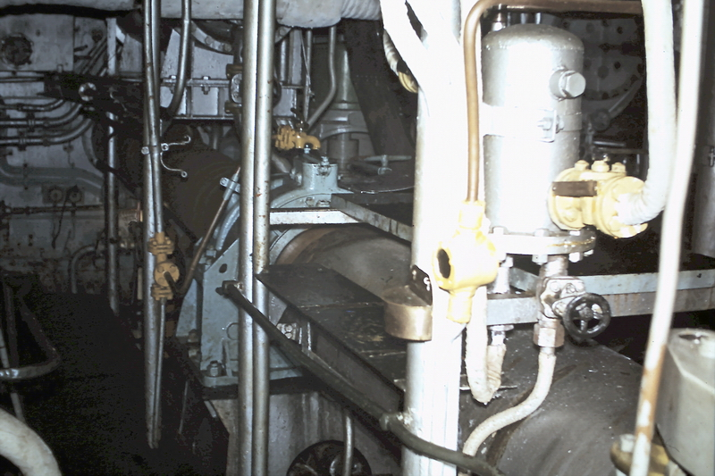 Ligne d'arbre tribord de l'escorteur d'escadre Kersaint. Vue d'un palier.